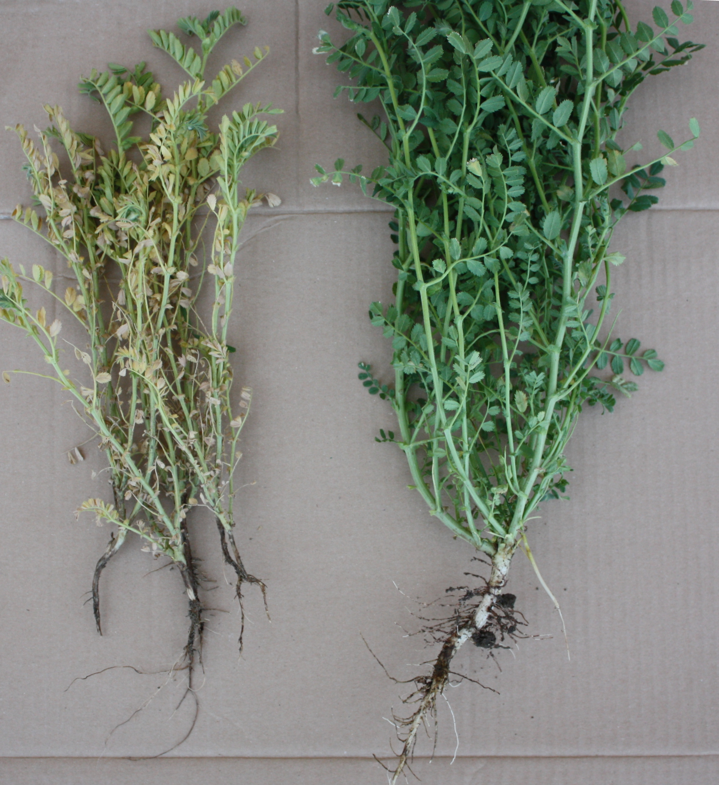 Differenze di sviluppo e cromtiche tra delle piante di cece colpite da Fusarium solani f.sp. pisi ed una pianta sana.